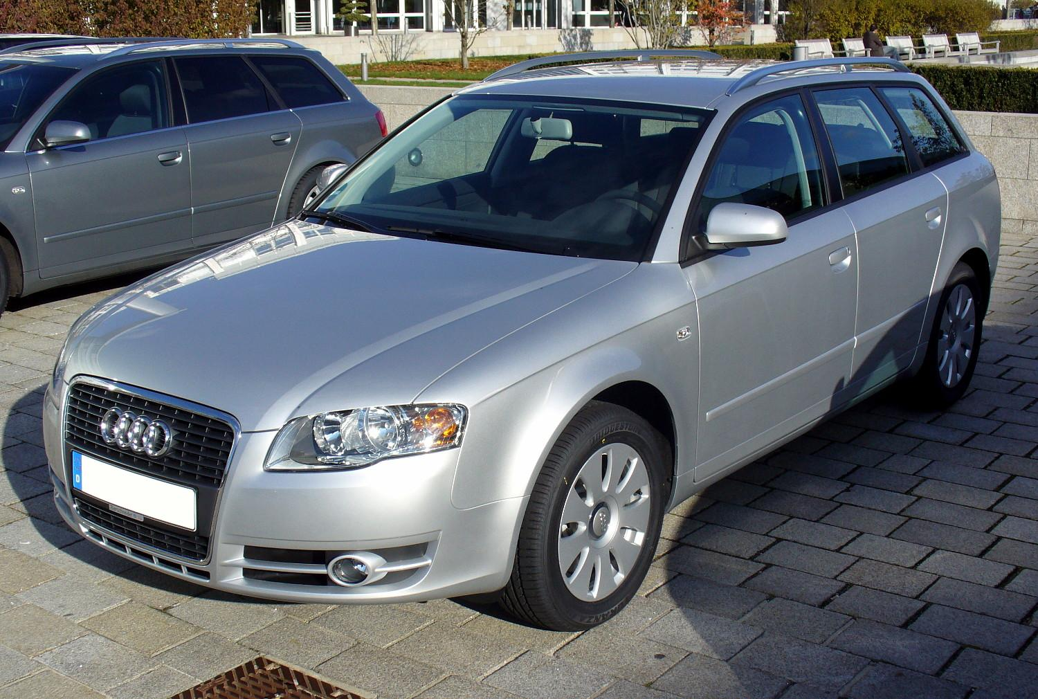 Audi A4 B7 Avant